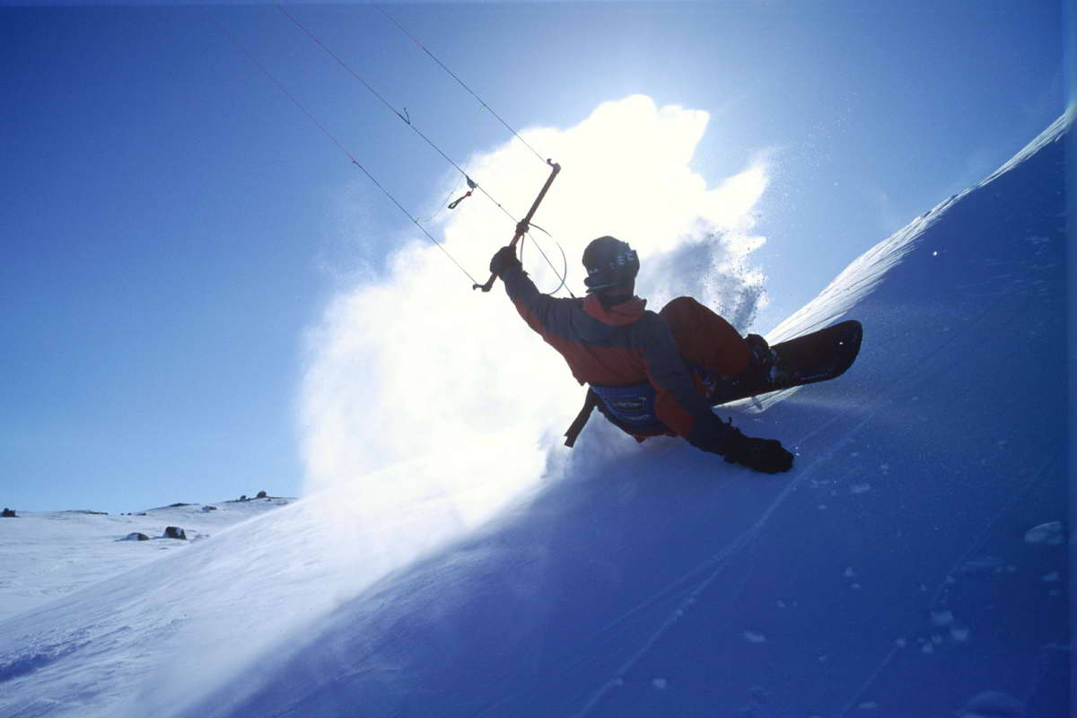 Wareck